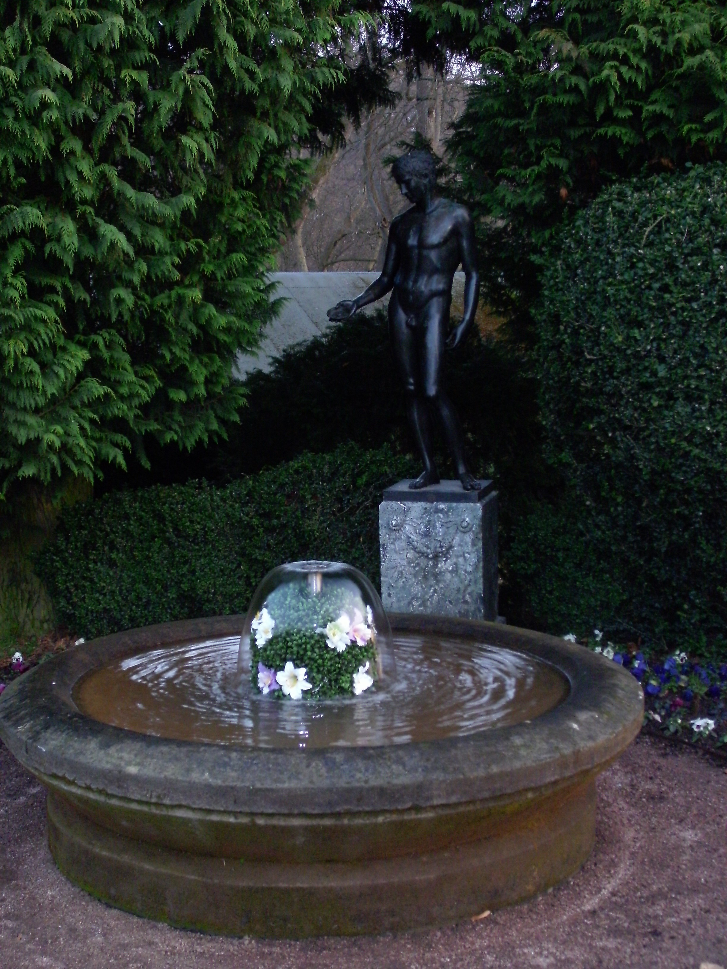 Udolinobrunnen im Schlosspark Altenstein